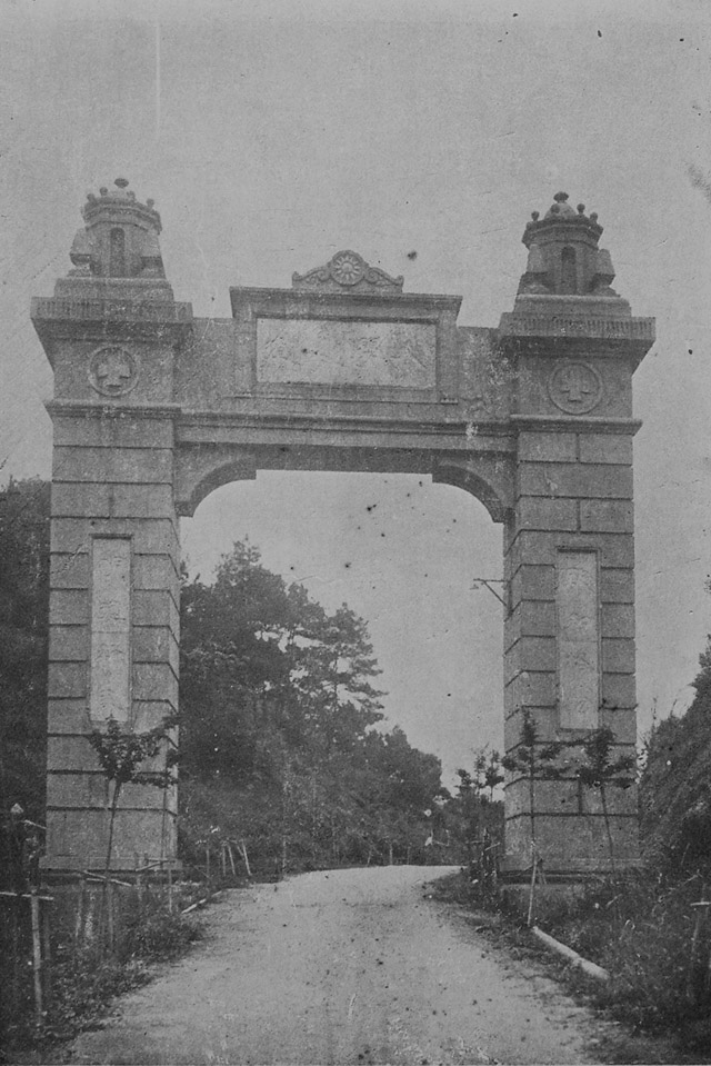 20世纪30年代，位于广西梧州蝴蝶山的广西大学校门。 文献出处：《广西大学一览》